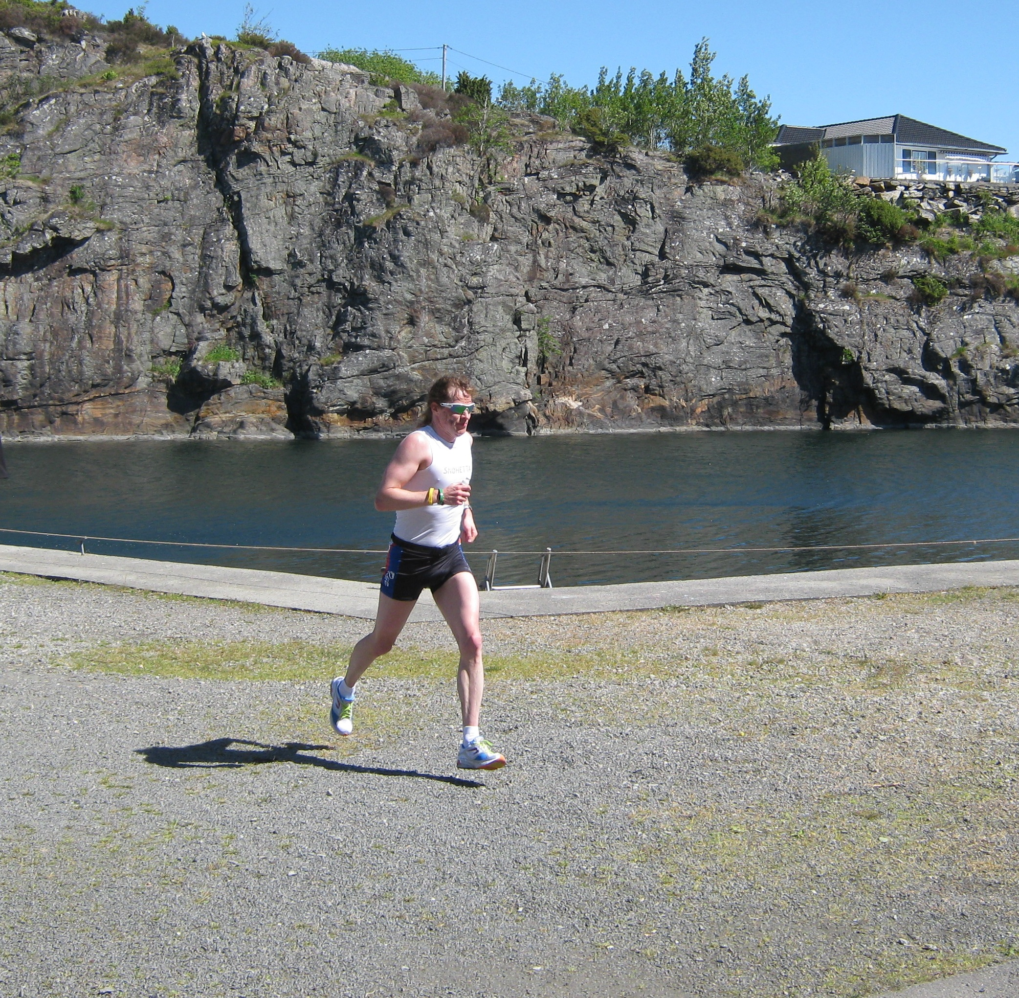 Frank Denis Kristiansen runder for siste gang på løpsdelen i Bergen Triathlon.